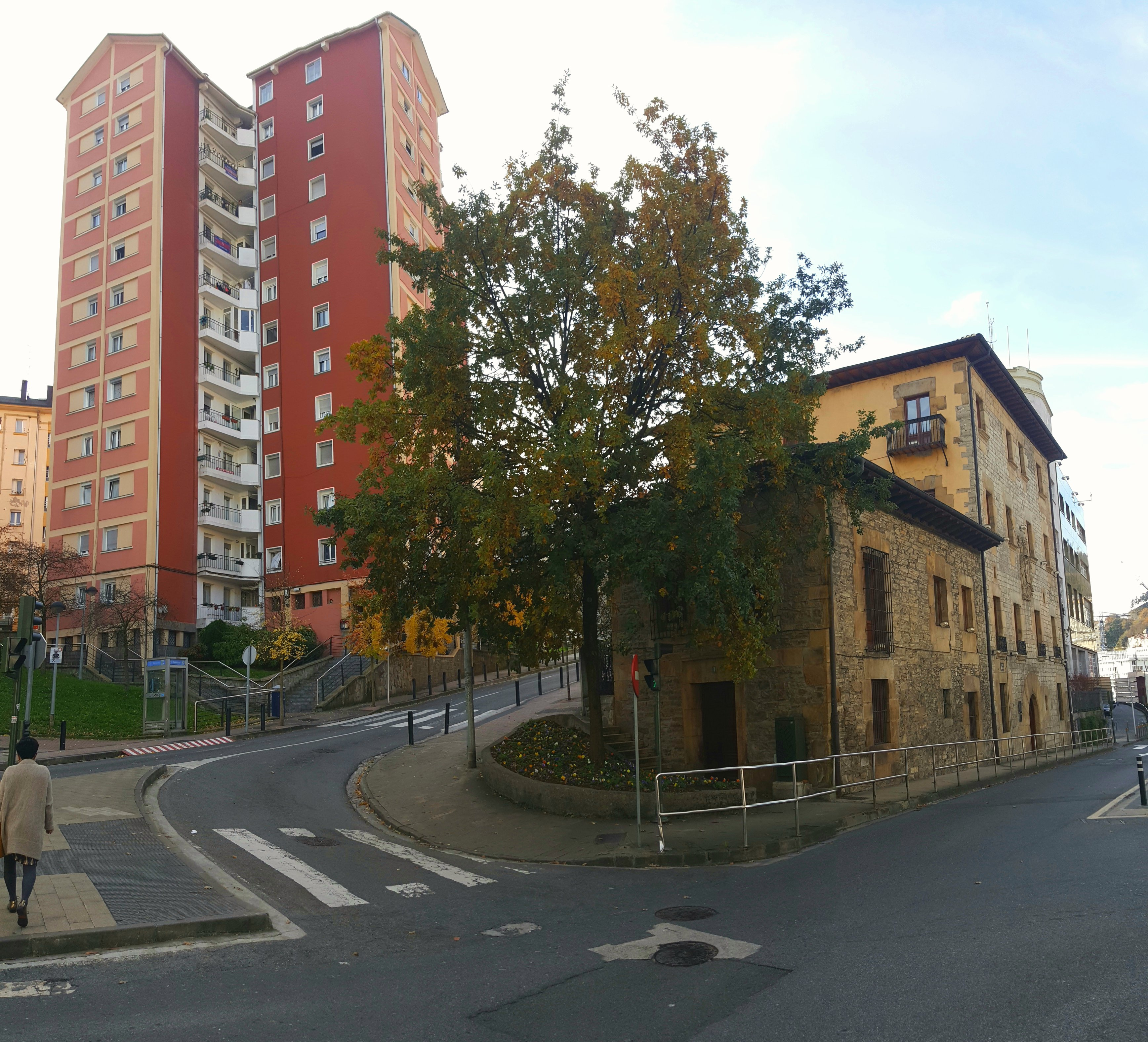 Eibarko jauregia, XVI. mendekoa. Atzean "dorretxea"